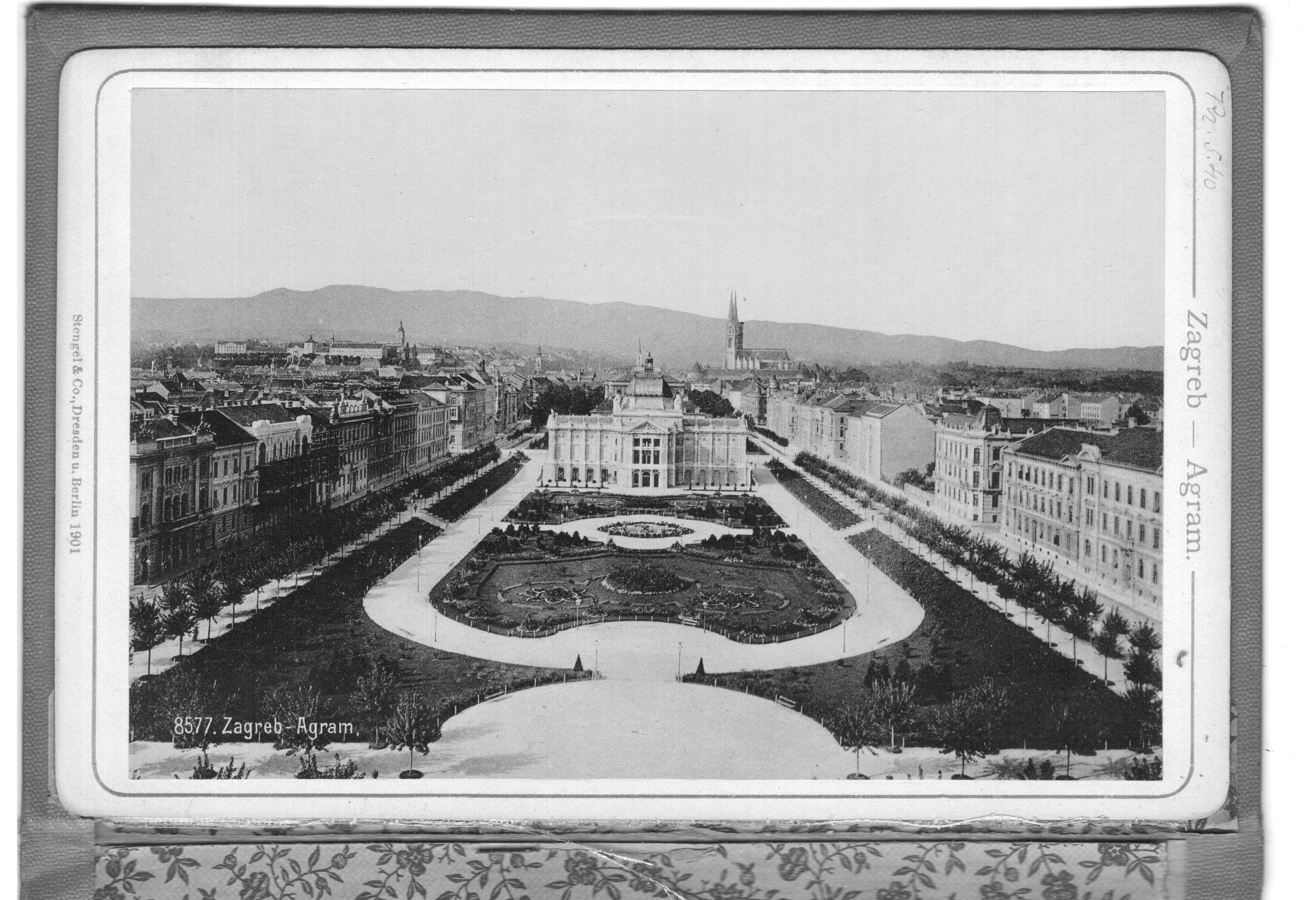 Osztrák-Magyar Monarchia, Zágráb. A Zágráb című fényképalbum 20, fehér kartonsorozatra ragasztott, fehér vászonnal összefűzött fényképéből. ©© Megjelent Creative Commons alatt a Metapolisz sorozatban. A Metapolisz sorozat valamennyi képe és filmje Creative Commons alatti valamint kereskedelmi - for profit - célra is felhasználható. Ajánlott hivatkozás: Derzsi Elekes Andor: Metapolisz DVD line ©© Published under Creative Commons in the Metapolisz DVD line. All of the photos and vids in the Metapolisz DVD line are under Creative Commons and can be used even for commercial – for profit – purposes. Recommended Citation Derzsi Elekes Andor: Metapolisz DVD line